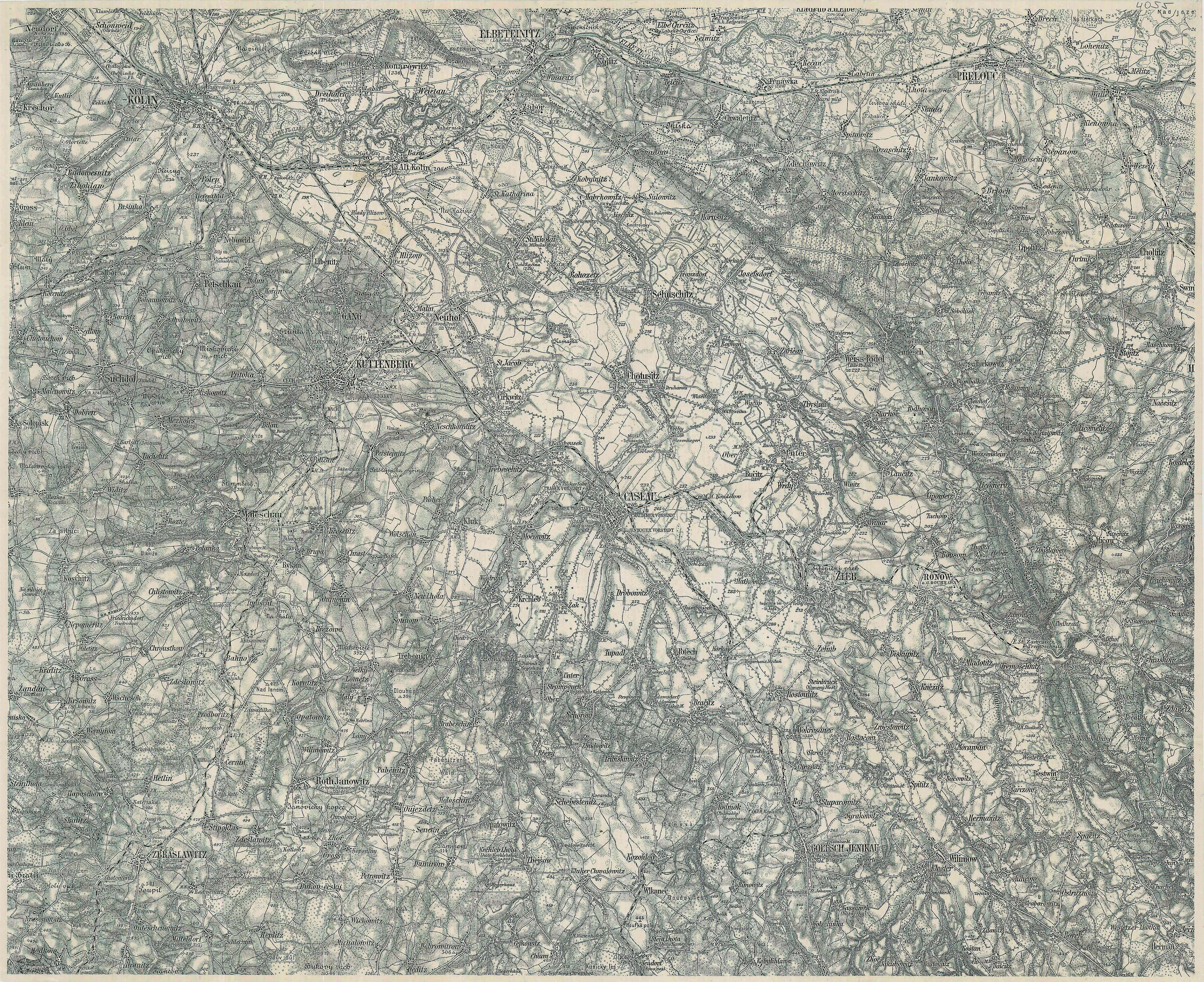 historische Landkarte: Spezialkarte 1:75.000, franzisco-josephinische (3.) Landesaufnahme der österreichisch-ungarischen Monarchie. Blatt außerhalb des Blattschnittes: Caslau (4055) mit Neu Kolin, Zbraslawitz, Kuttenberg, Prelouc (aus dem östlichen Bereich des Blattes 4054 und südlichem Streifen aus 3954 und 3955), dem Tal der Doubrawa, Goltsch Jenikau, Zleb, Ronow aus 4055, aber nicht mehr Hermanmestetz, Chrudim, Habern und Nassaberg aus 4055). Der senkrechte Strich links entstand beim Scannen und ist im Original nicht vorhanden. Die Karte hat nicht den üblichen Rahmen (siehe den Rand) und die Beschriftung nimmt auf den Rand nicht Rücksicht (siehe das H von Hermanmestez links außen).